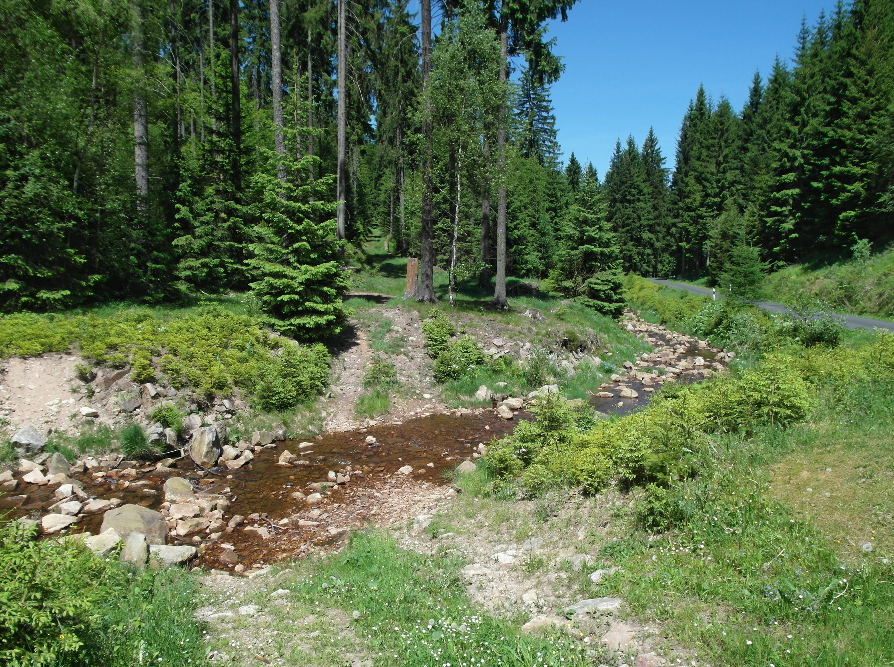 01.06.2017 01773 Schellerhau (Altenberg/Sachs.): Flußlandschaft im oberen Osterzgebirge am Puschmühlenweg bei einer Furt durch die Rote Weißeritz. (GMP 50.780280,13.703391) [SAM0015.JPG]20170601100DR.JPG(c)Blobelt